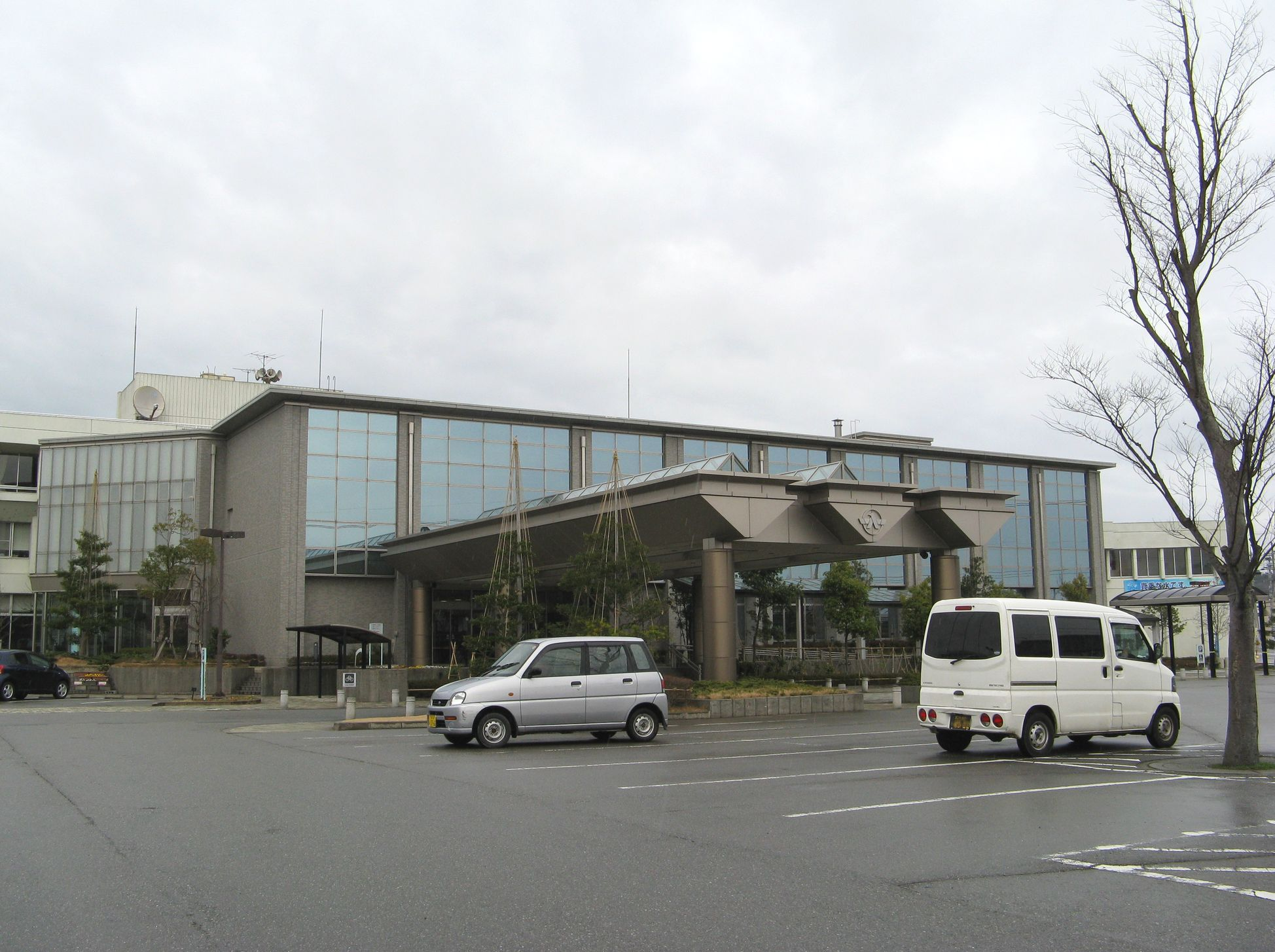 津幡町役場 2007年12月 Bakkai撮影